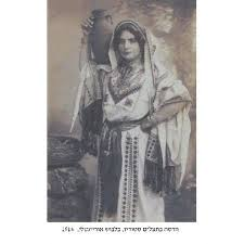 הדסה פרלמן-קלוורי-רוזנבליט בשמלה רקומה